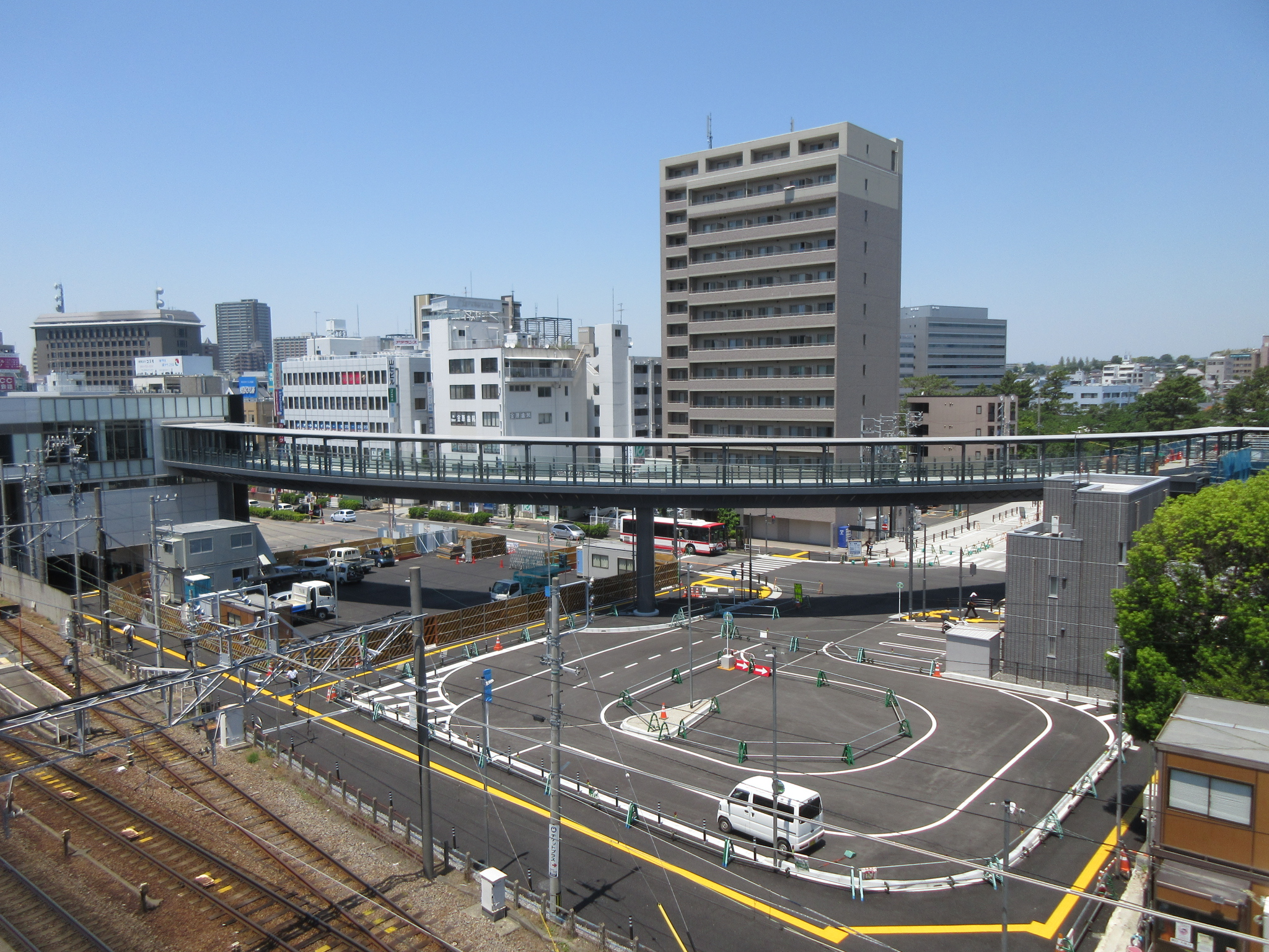 東岡崎駅の東改札口に接続するペデストリアンデッキ。2019年5月撮影。